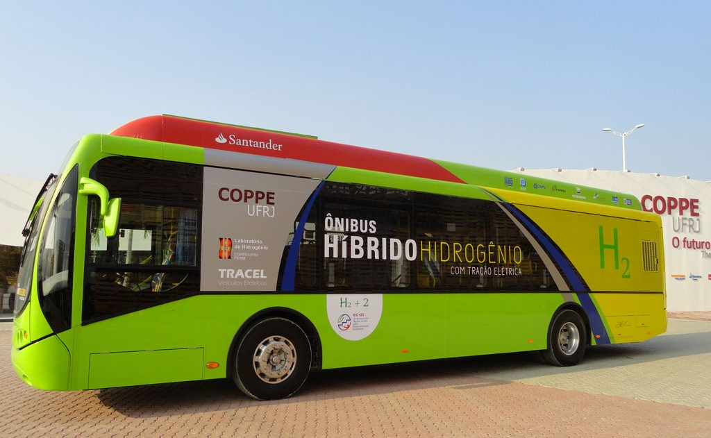 Federal University of Rio de Janeiro